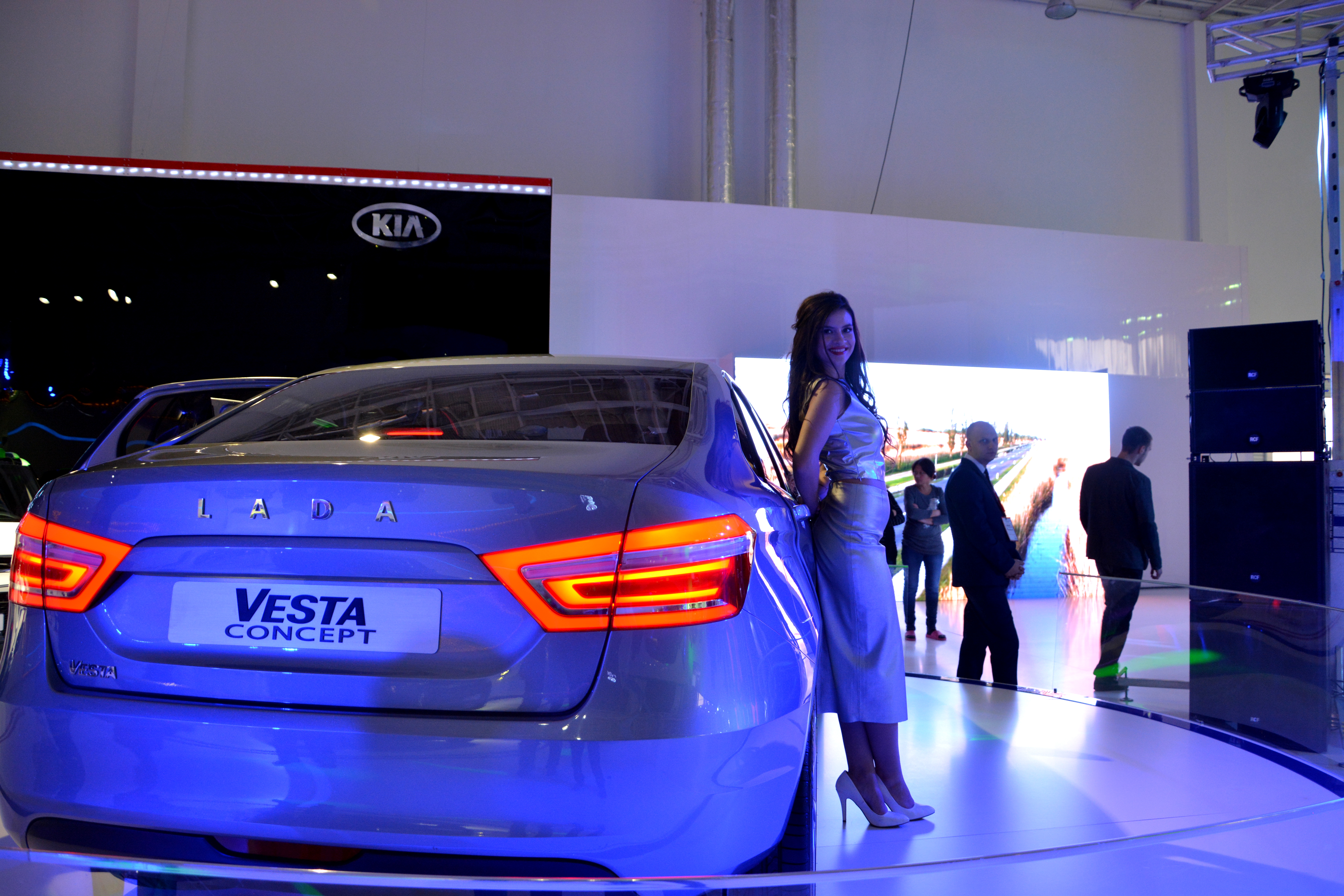 Концепт Lada Vesta